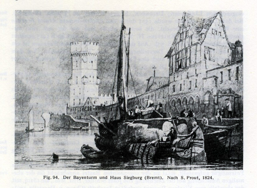 Kölner Stadtbefestigung. Bayenturm und Haus Siegburg (Bremt)nach S. Prout 1824